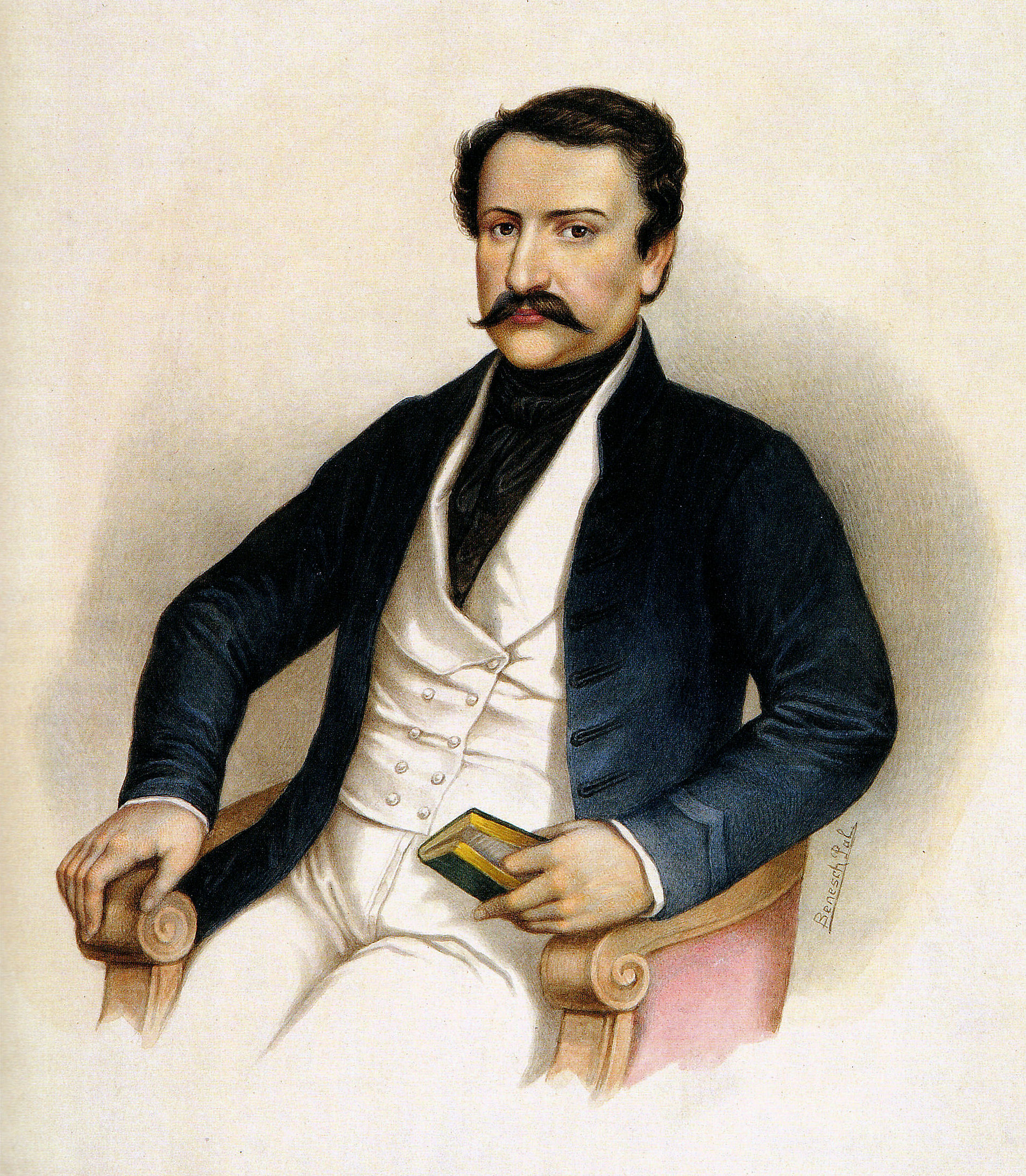 Benesch Pál: Deák Ferenc. Akvarell (1840 körül). Budapesti Történeti Múzeum